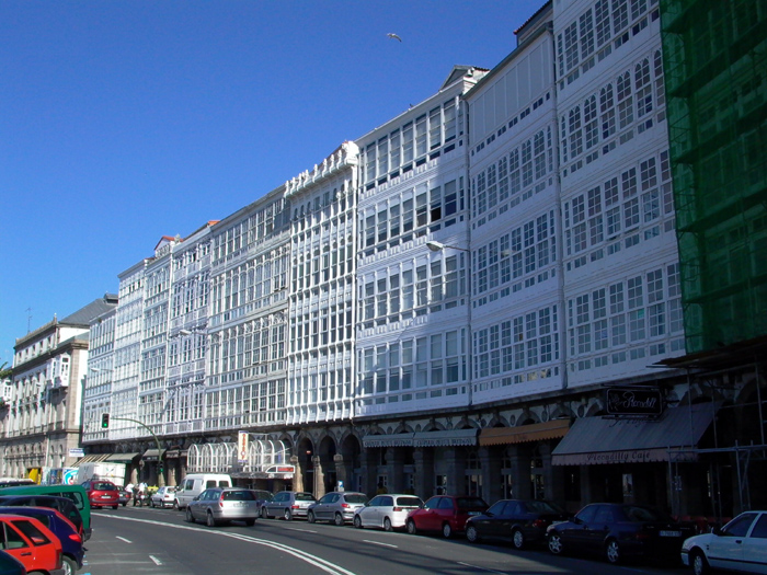 Picture taken by Daniel van der Ree, The Netherlands